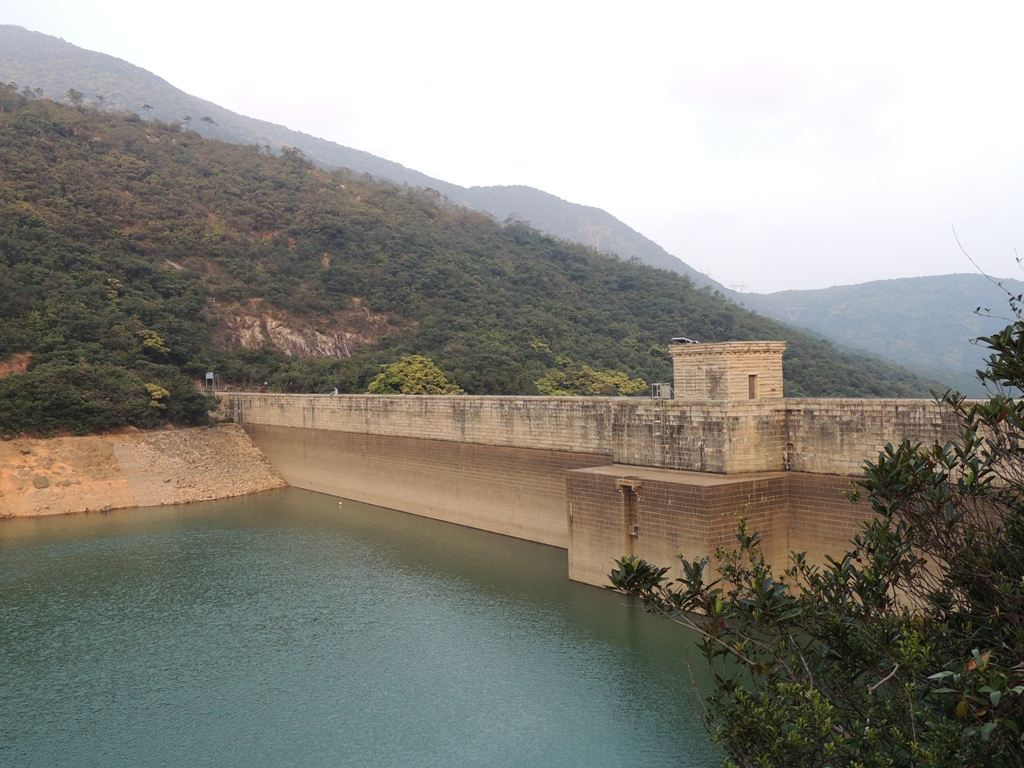 Tai Tam Upper Reservoir